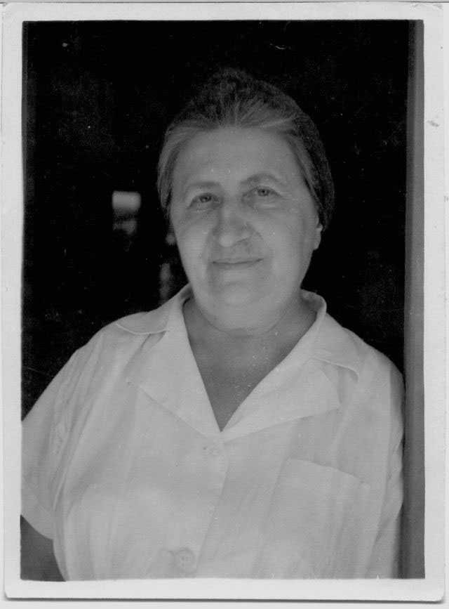 לאה ברלין